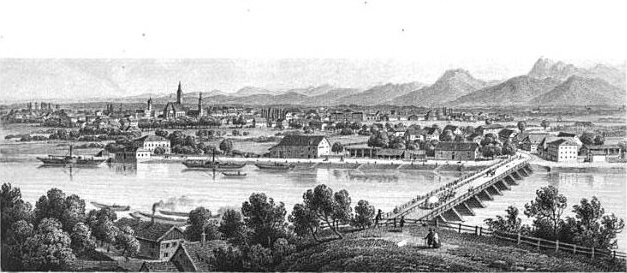 Rosenheim um die Mitte des 19. Jahrhunderts